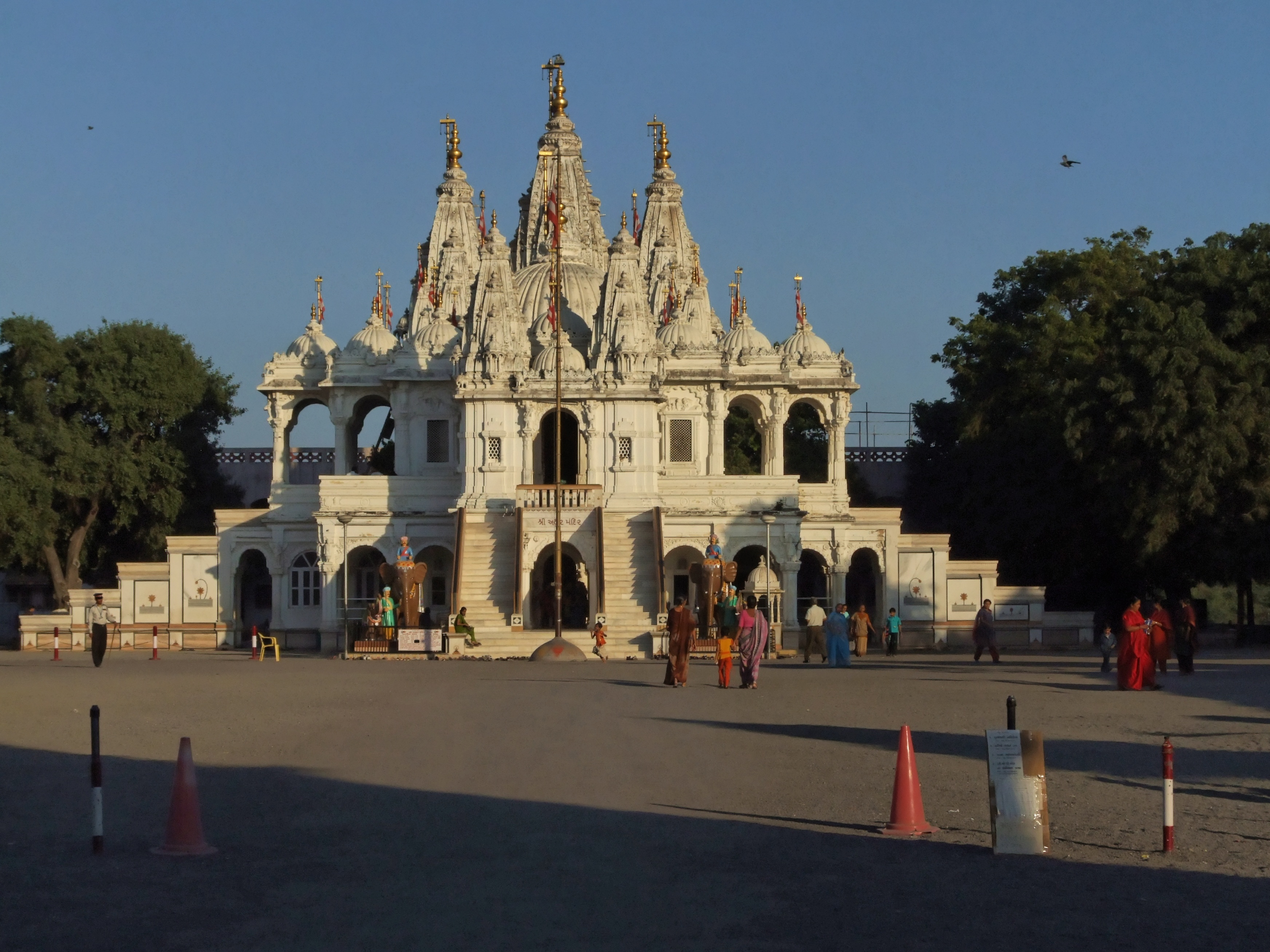 Goandal - Swaminarayan Temple, Gujarat - India Gondal - Swaminarayan Temple, Gujarat